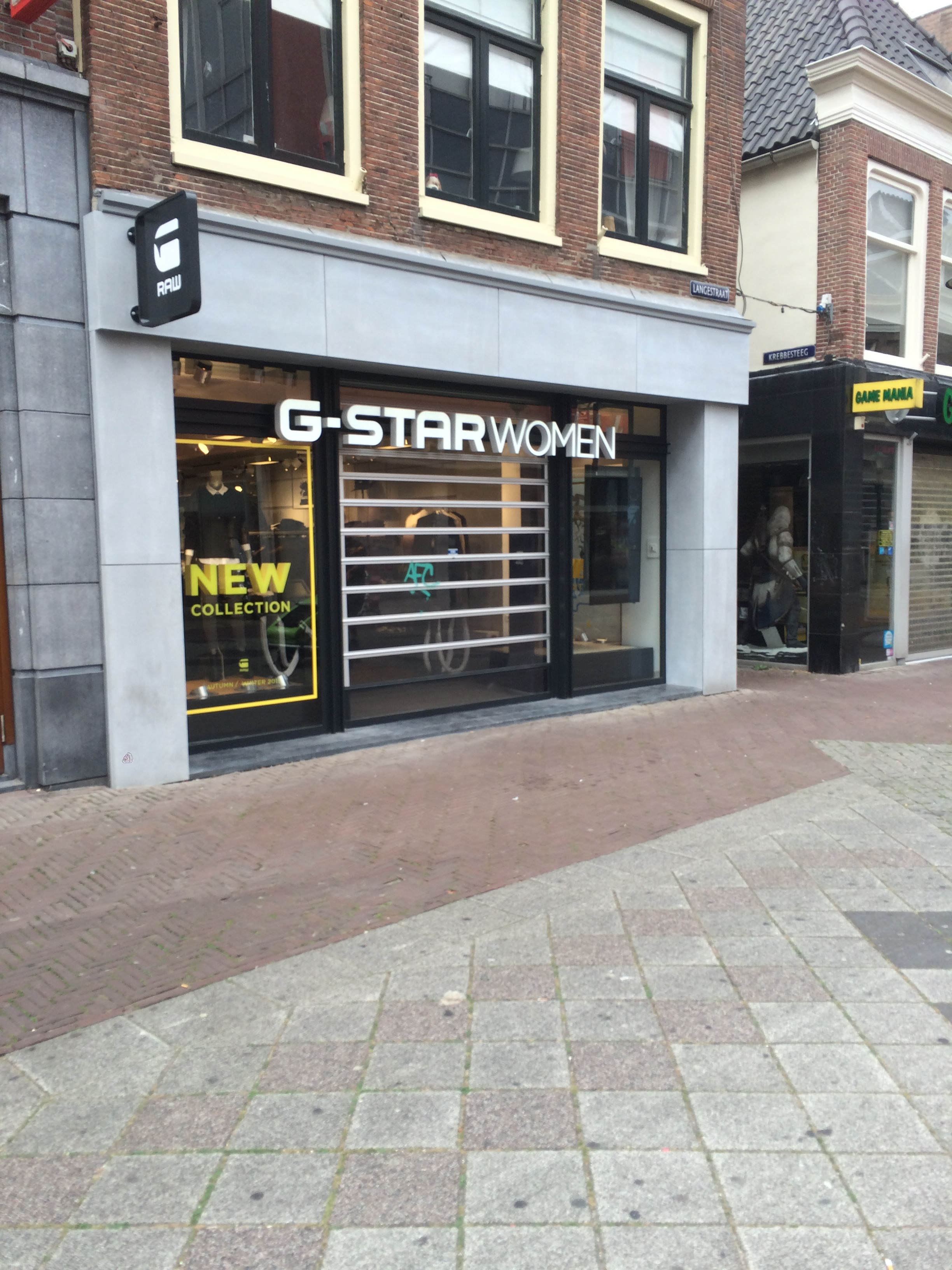 G-Star Shop